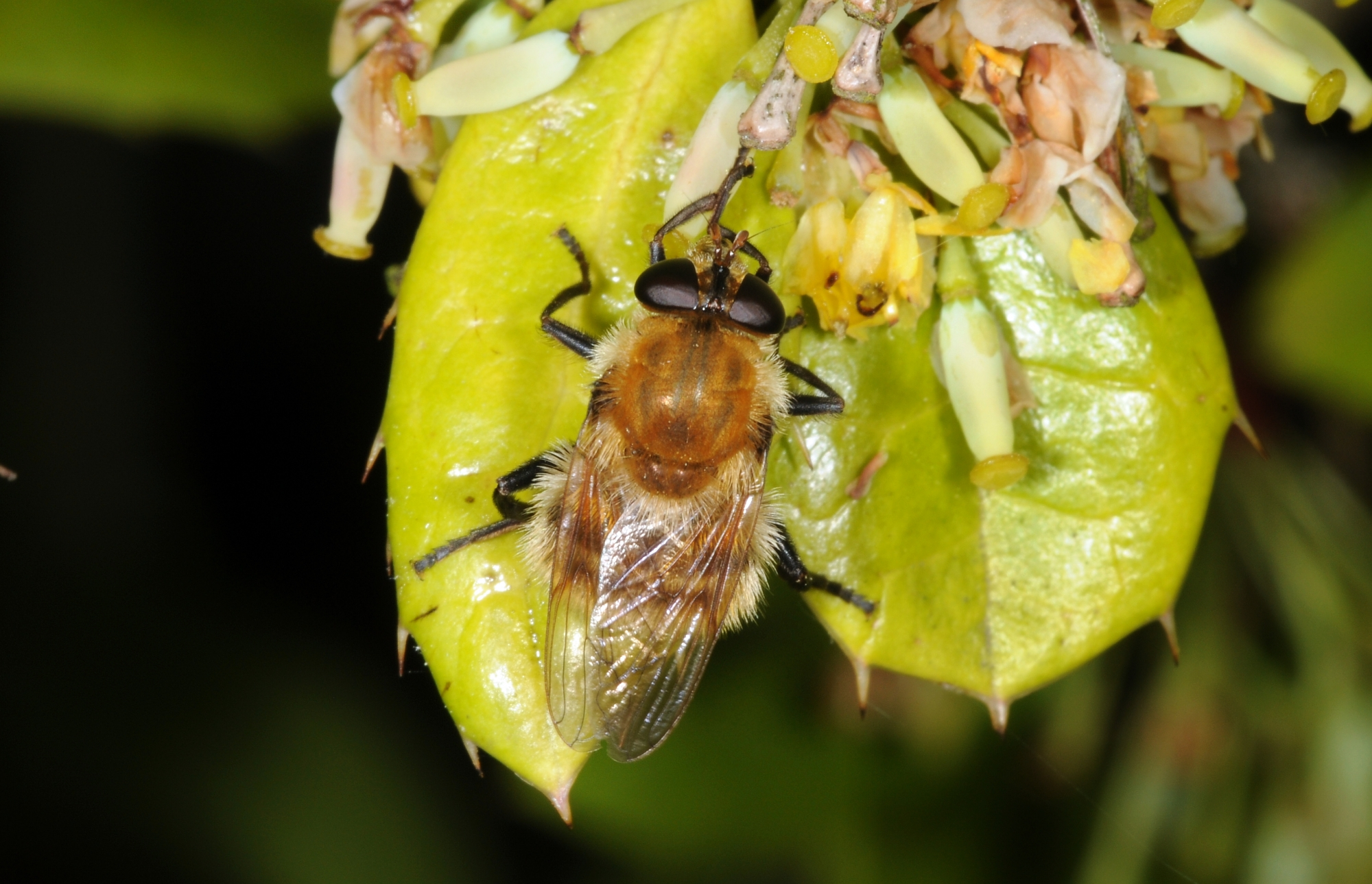 cf. Criorhina berberina oxycanthae an Berberis julianae, Botanischer Garten auf den Lahnbergen, Marburg, Hessen, Deutschland